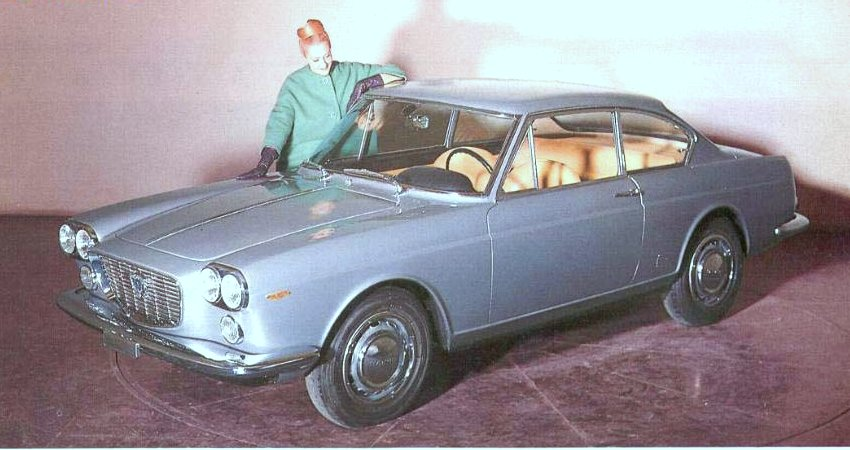 Un'immagine della Flavia Coupé disegnata da Pininfarina (1964).